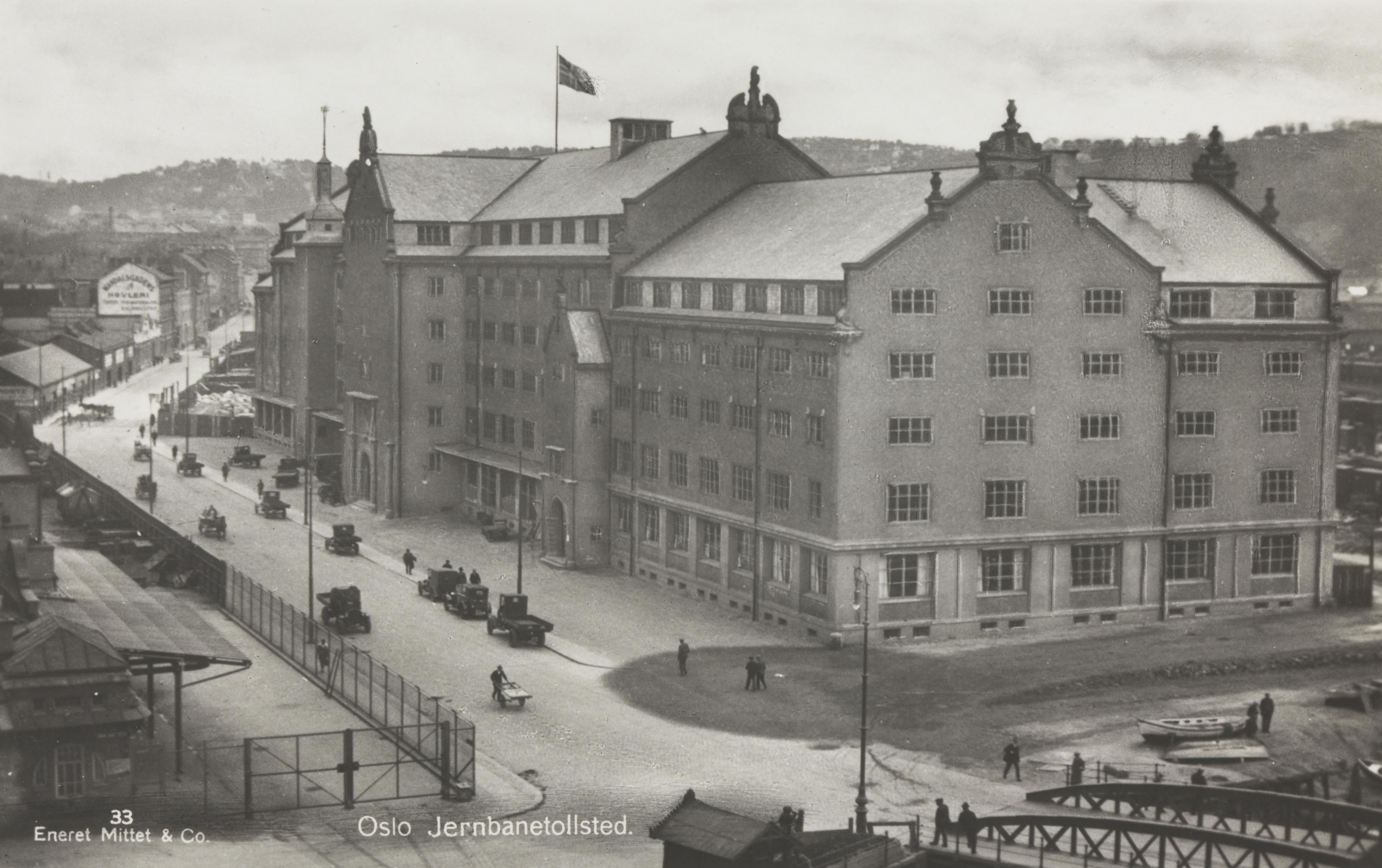 Bildet er hentet fra Nasjonalbibliotekets bildesamling Oslo, Oslo. Oslo Jernbanetollsted, Schweigaards gate 15. Del av området til Kristiania Slagtehus i Schweigaards gate 2 til venstre.